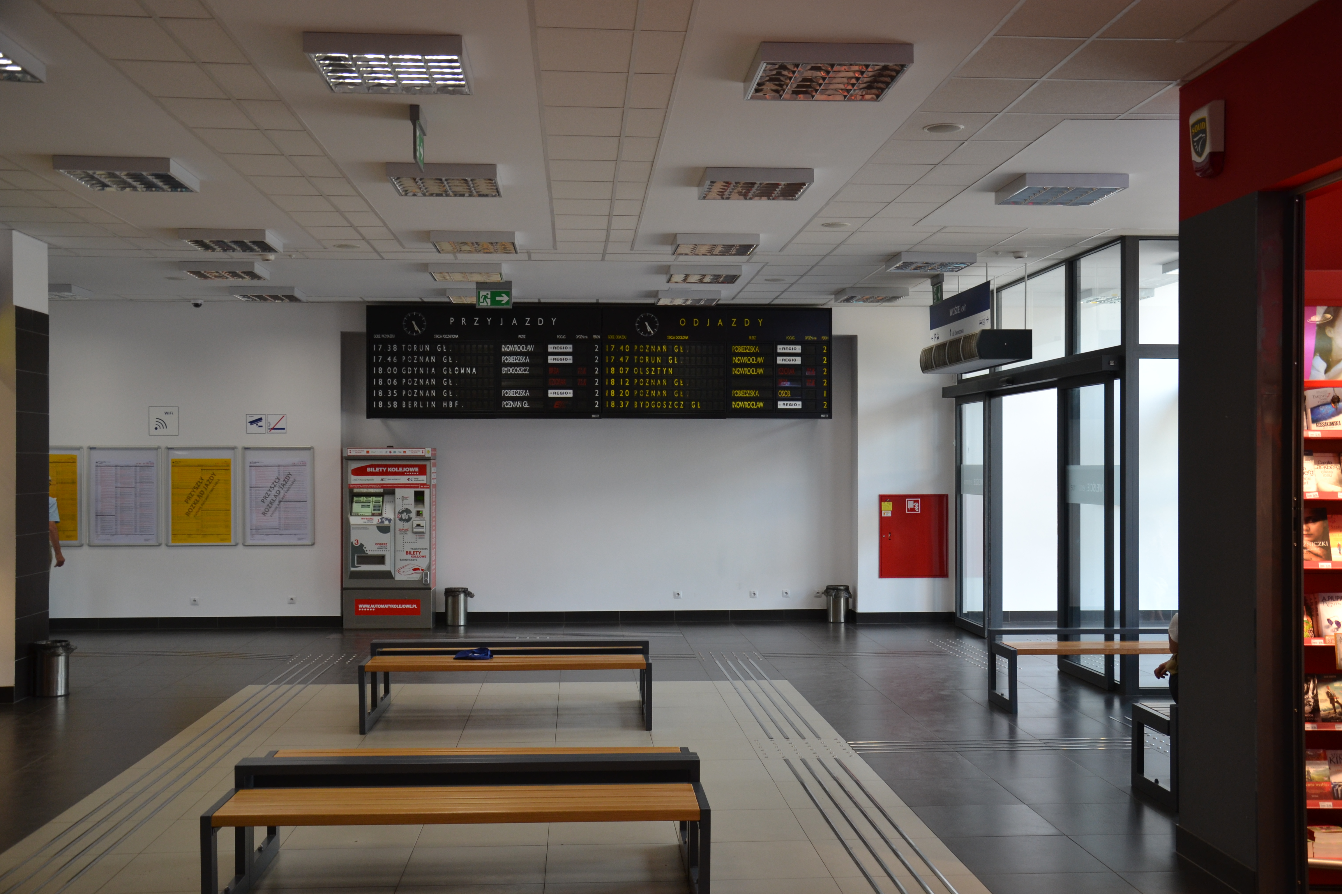 Wnętrze budynku dworca kolejowego w Gnieźnie This photo was taken during Railway Wikiexpedition 2015 set up by Wikimedia Polska Association in cooperation with Fundacja Grupy PKP. You can see all photographs in category Wikiekspedycja kolejowa 2015.